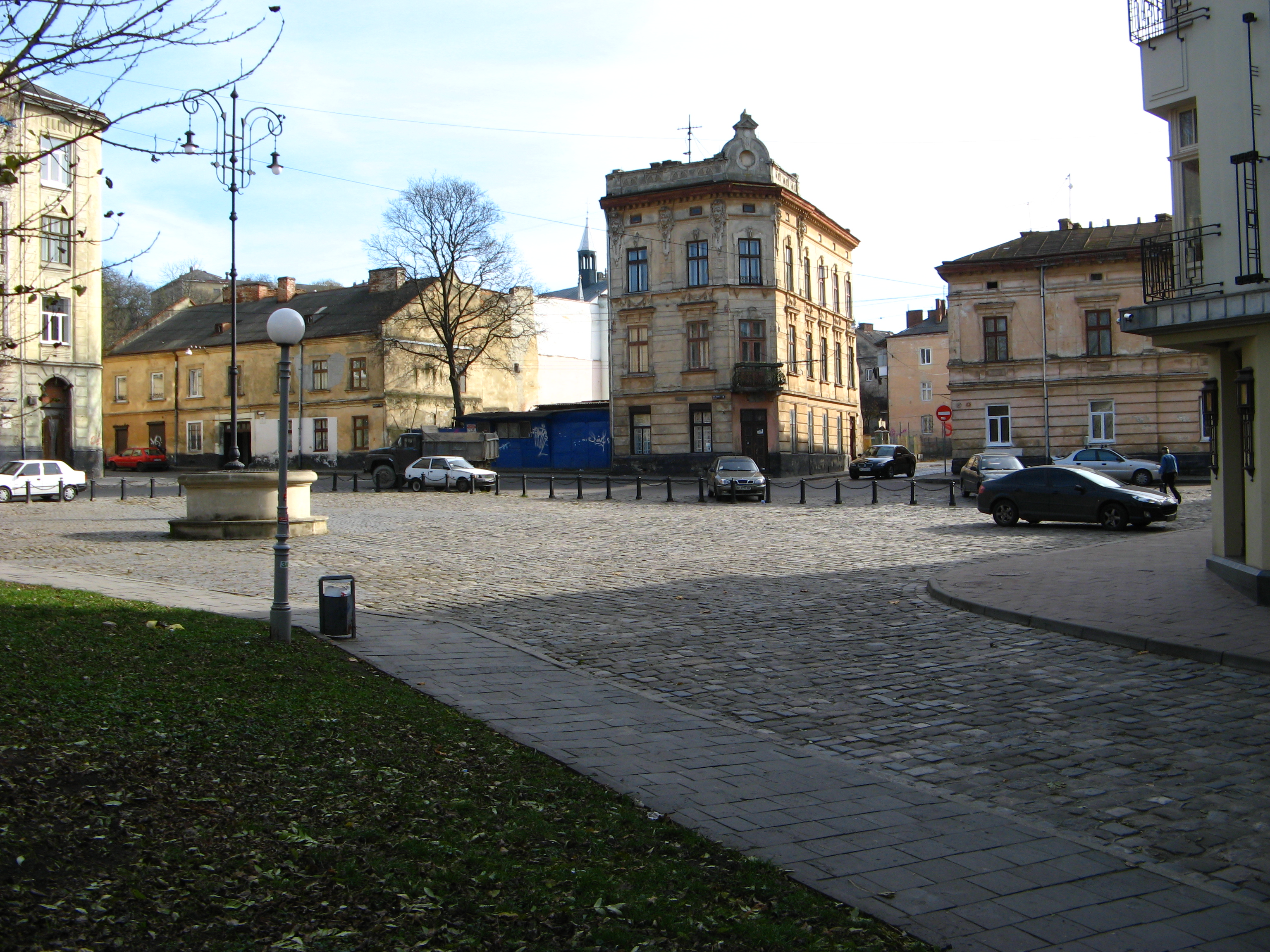 Sraruj_Rynok.jpg: площа Старий Ринок (Львів)